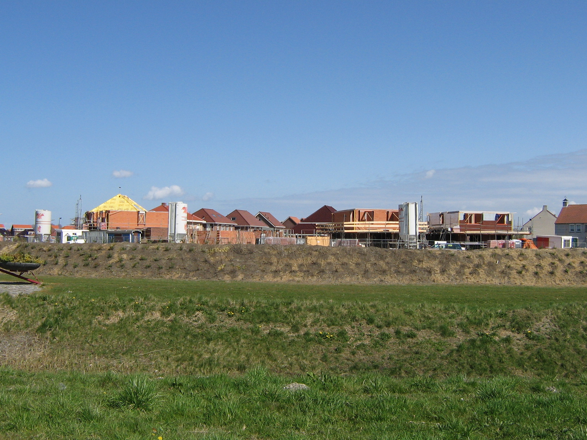 Nieuwbouwiek bie Erremu Nieuwbouwwijk bij Arnemuiden